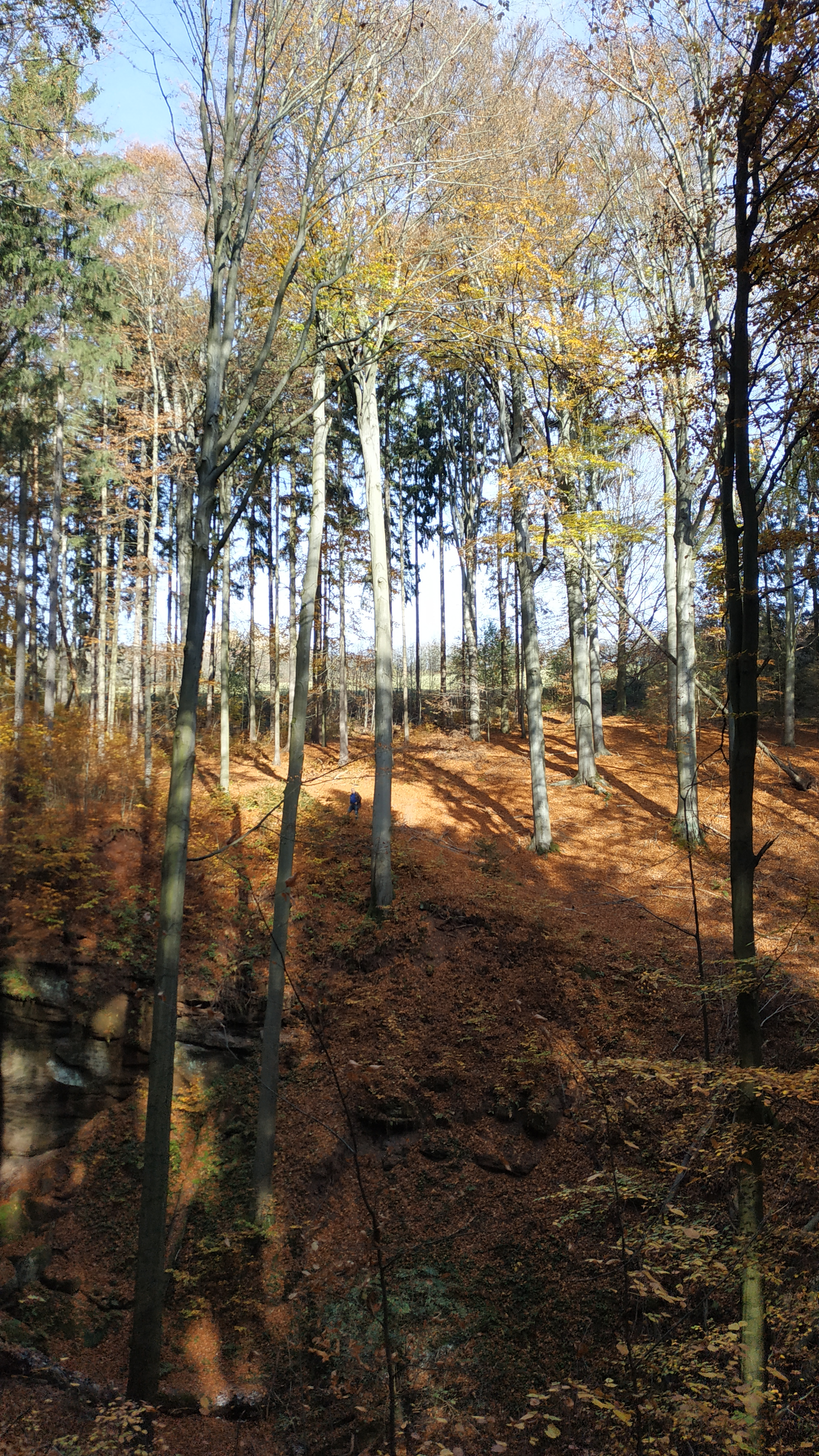 Okolní flóra- vzrostlé buky a smrky v přírodní památce Novopacký vodopád